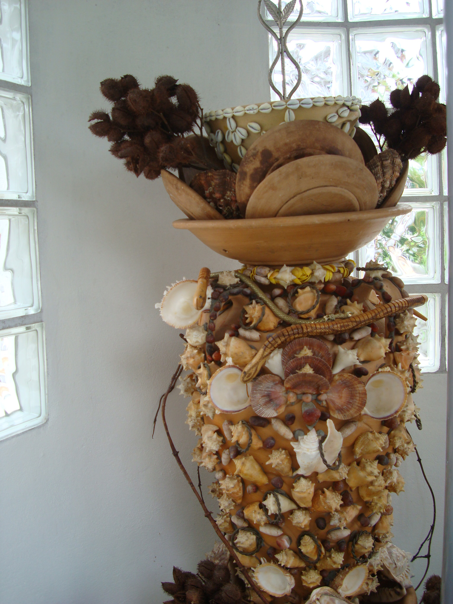 Assentamento sagrado do Orixa Oxumare, Dan, Dangbe, Becem. Orossi, ssa Bahia.